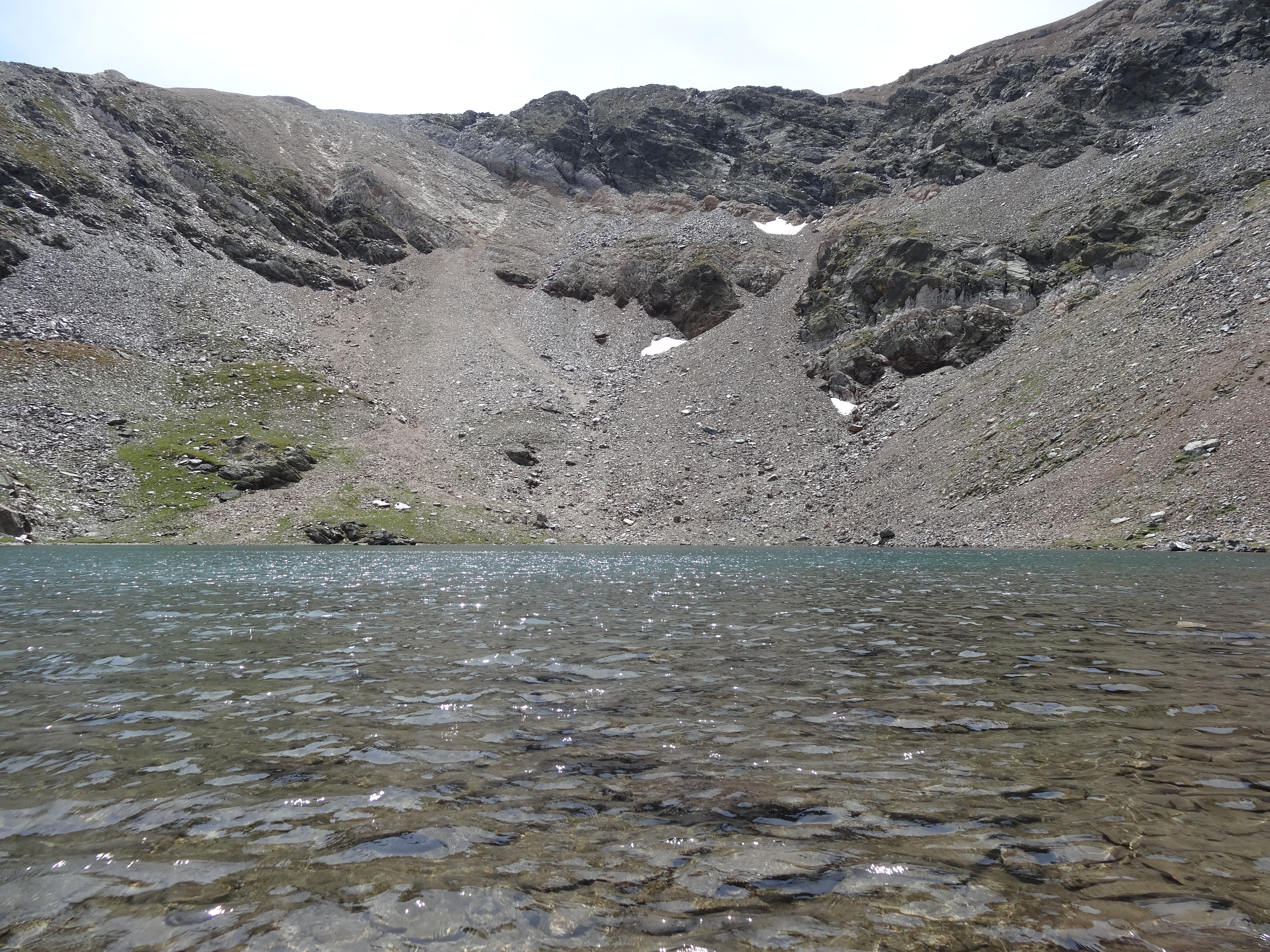 Estany Blau al Circ de Carançà (juliol 2012)